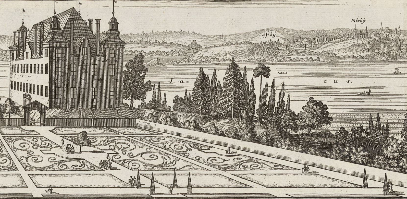 Ekebyholm (utsnitt) Padtbrugge, Herman, 1656-1687 (Gravör) Dahlbergh, Erik, 1625-1703 (Kommissarie)